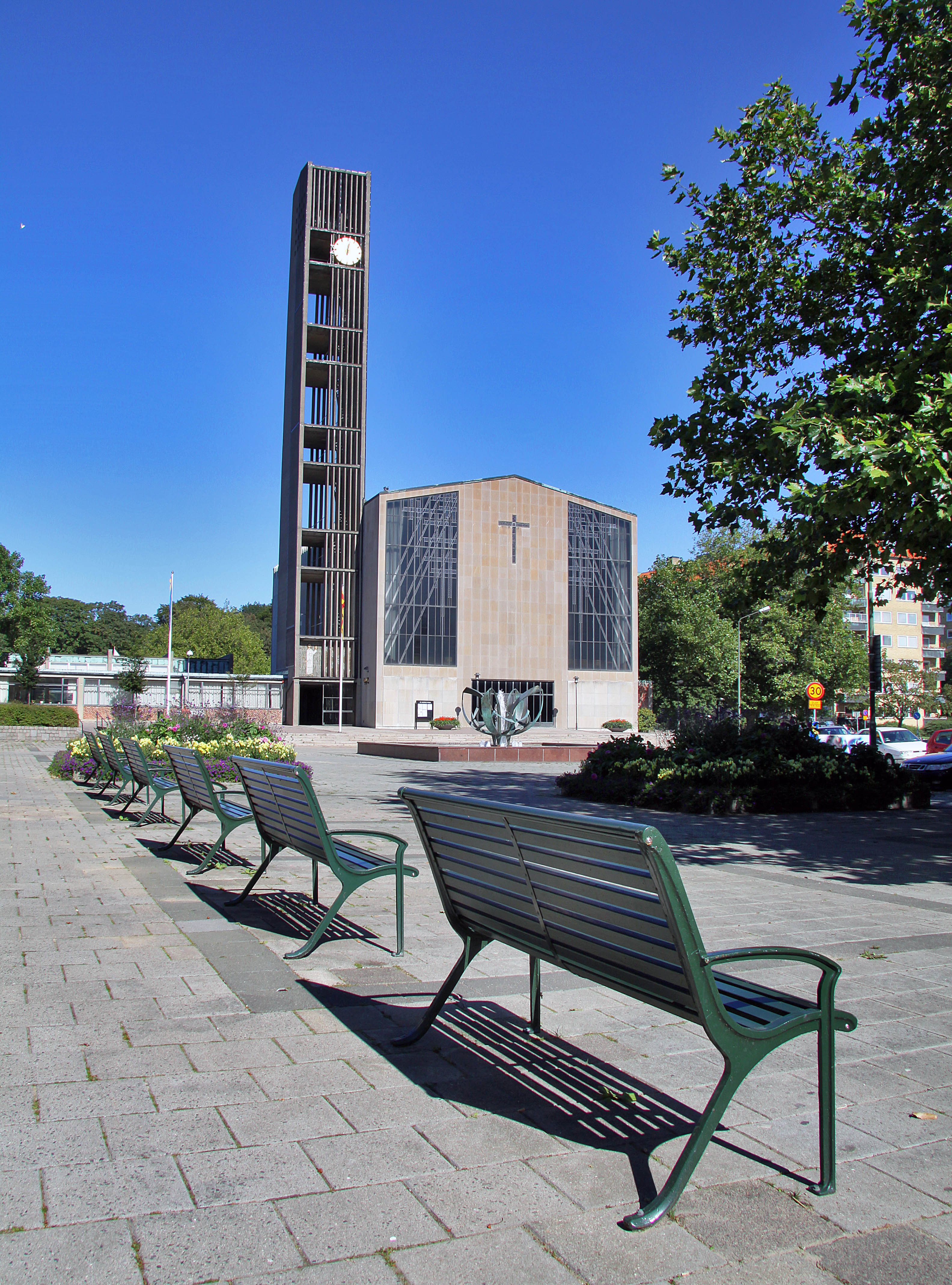 Fridhemstorget, S:t Andreas kyrka, Slottsstadens församling, Malmö, Lunds stift